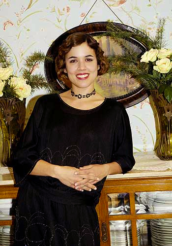 La actriz española Adriana Ugarte en el papel de la protagonista de la serie La Señora